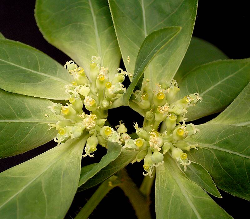 Euphorbia dentata